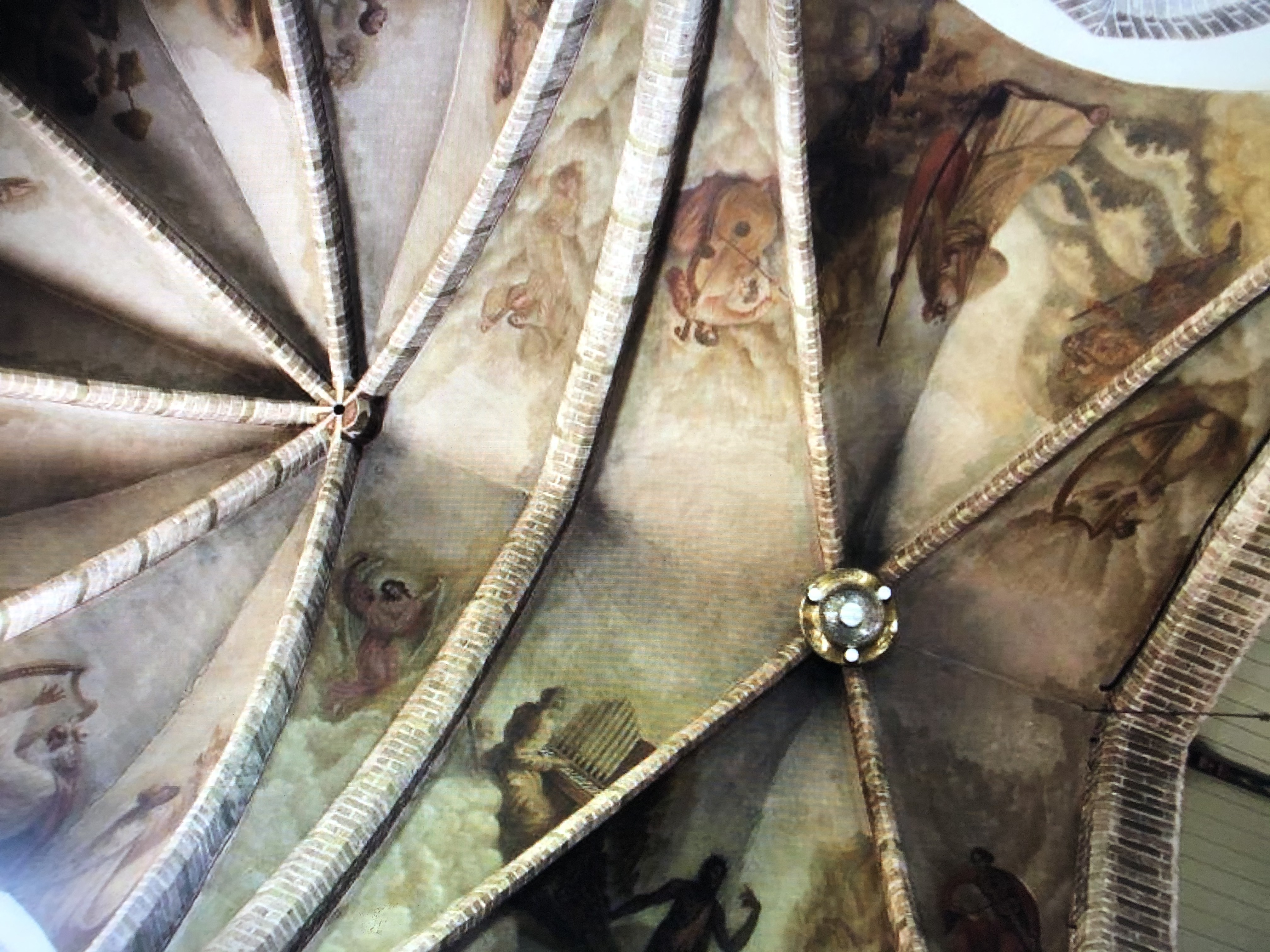 foto van het gewelf met schilderingen, kerk Nes